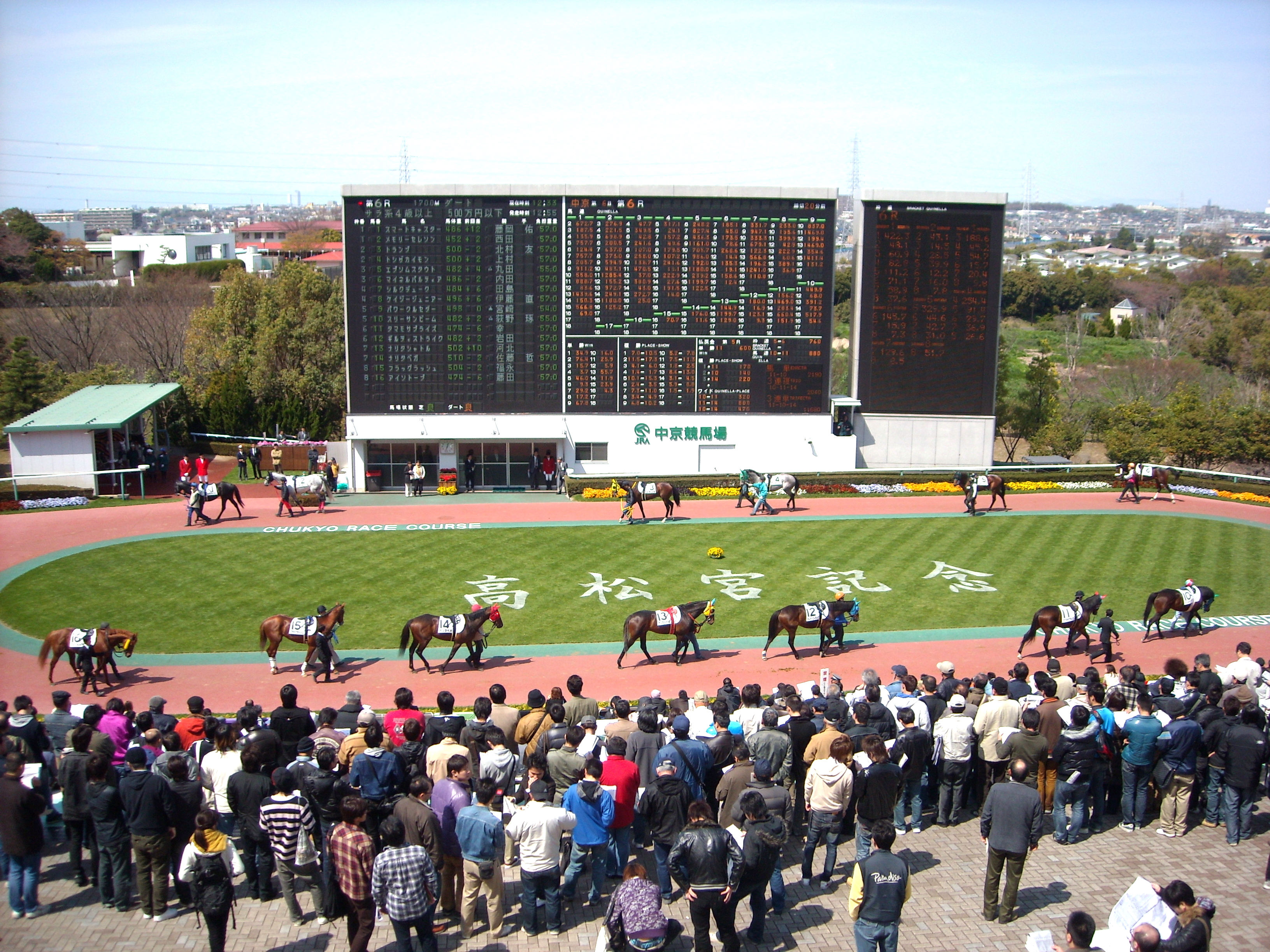 中京競馬場パドック